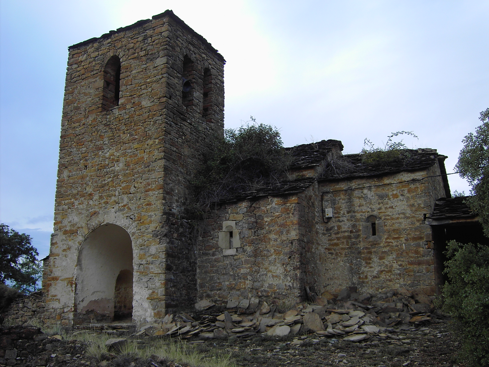 La iglesia de Lascorz, en el municipio altoaragonés de La Fueva, Huesca.